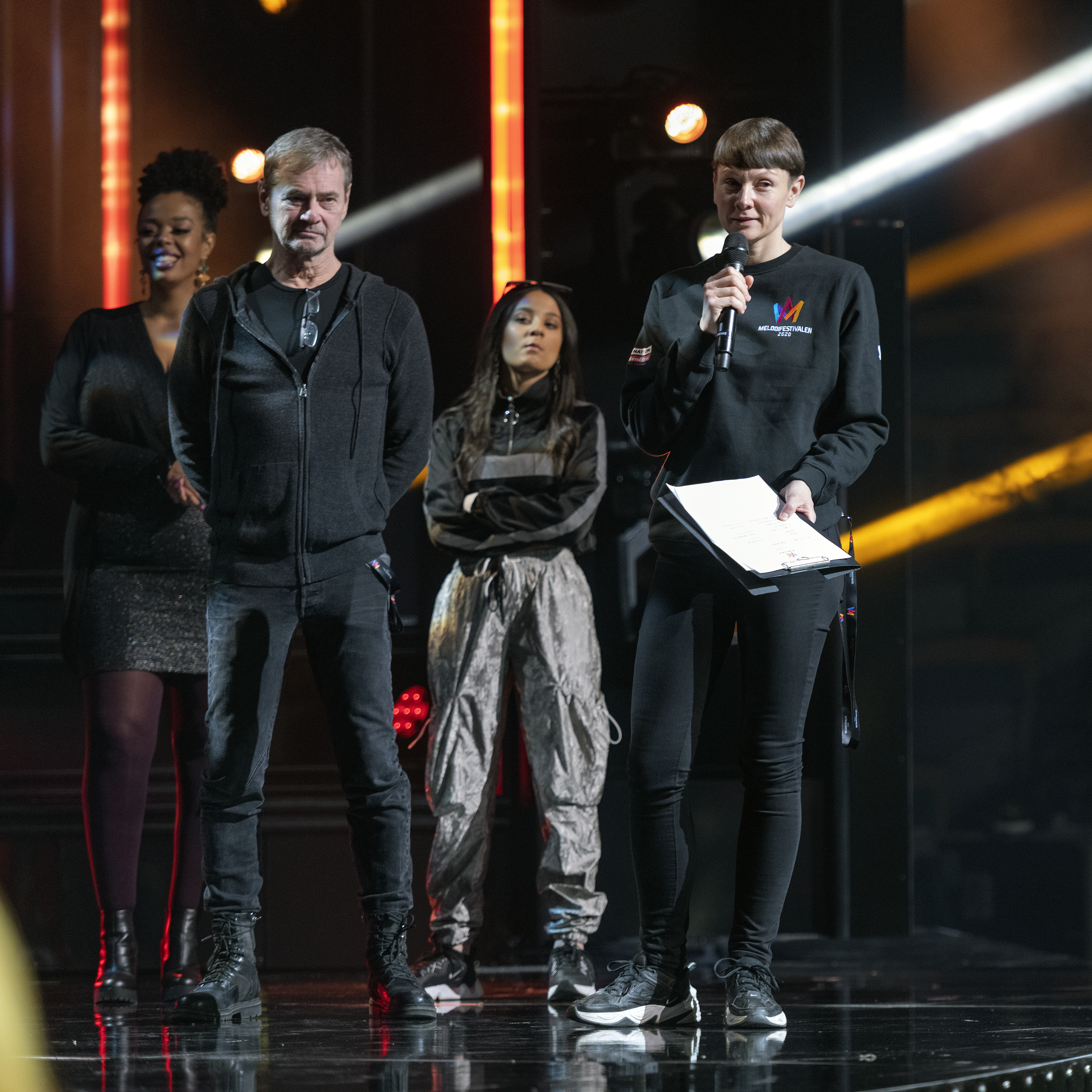 Christer Björkman Karin Gunnarsson festivalgeneraler Melodifestivalen 2020 Linköping prresskonferens